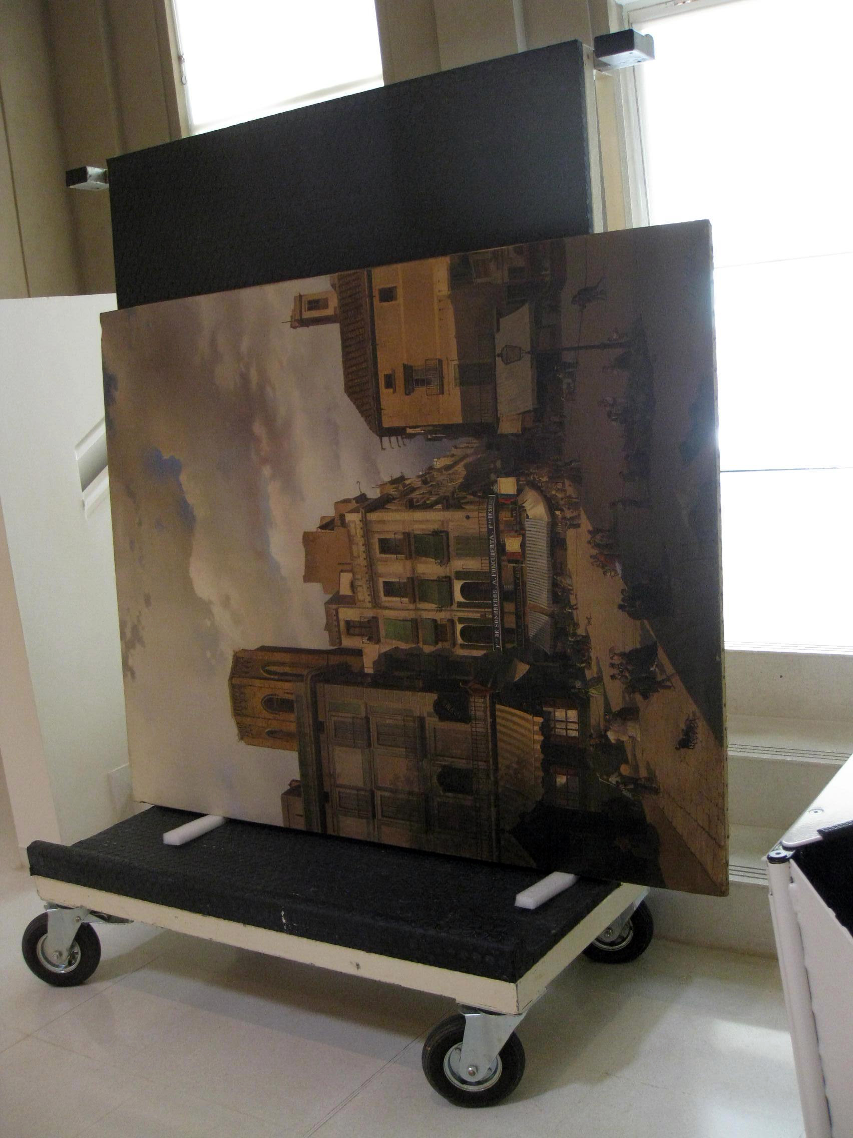 Palau Nacional (Barcelona)